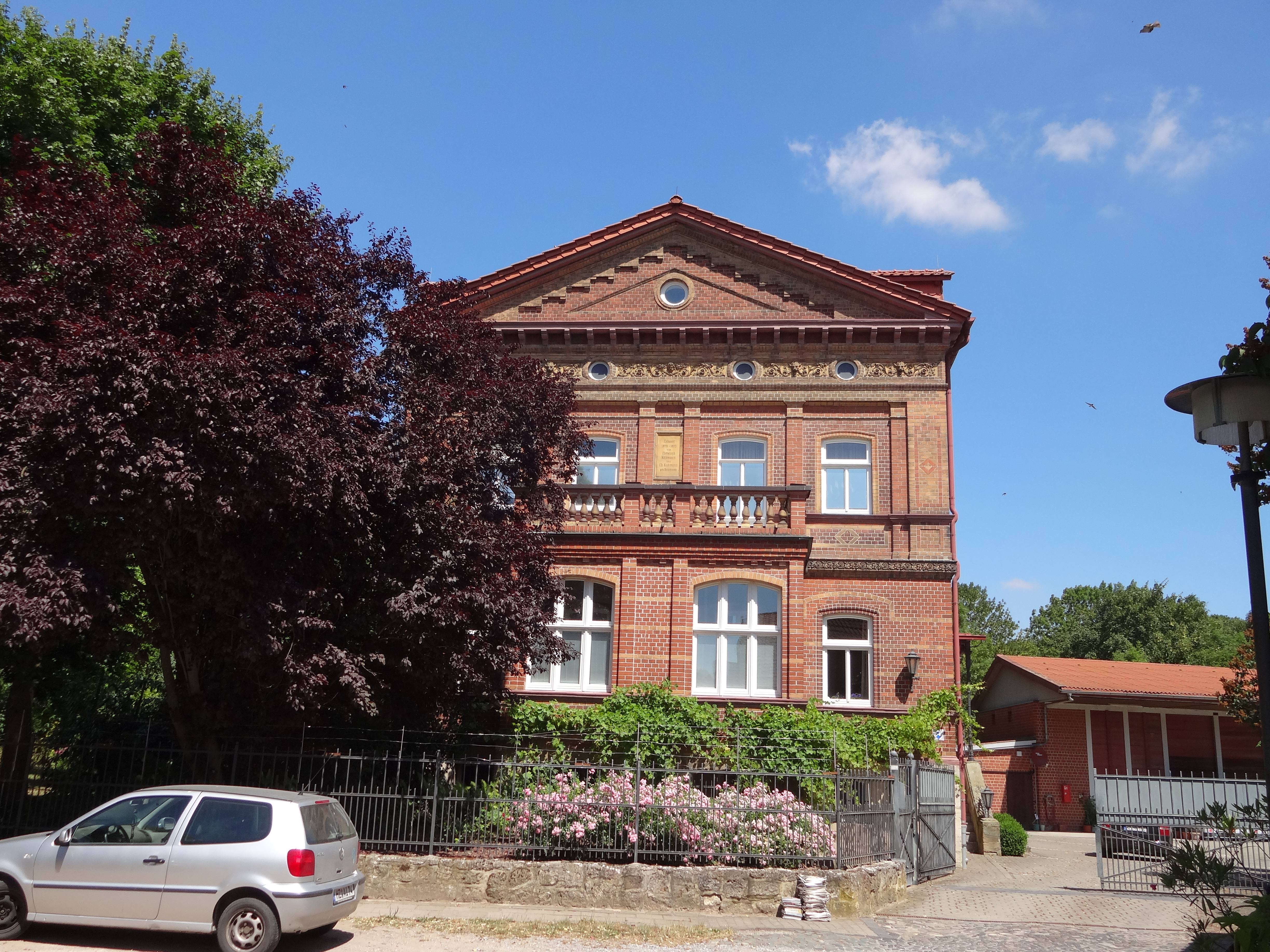 denkmalgeschützte Villa in der Lindenstraße 66 in Vogelsdorf (Gemeinde Huy)